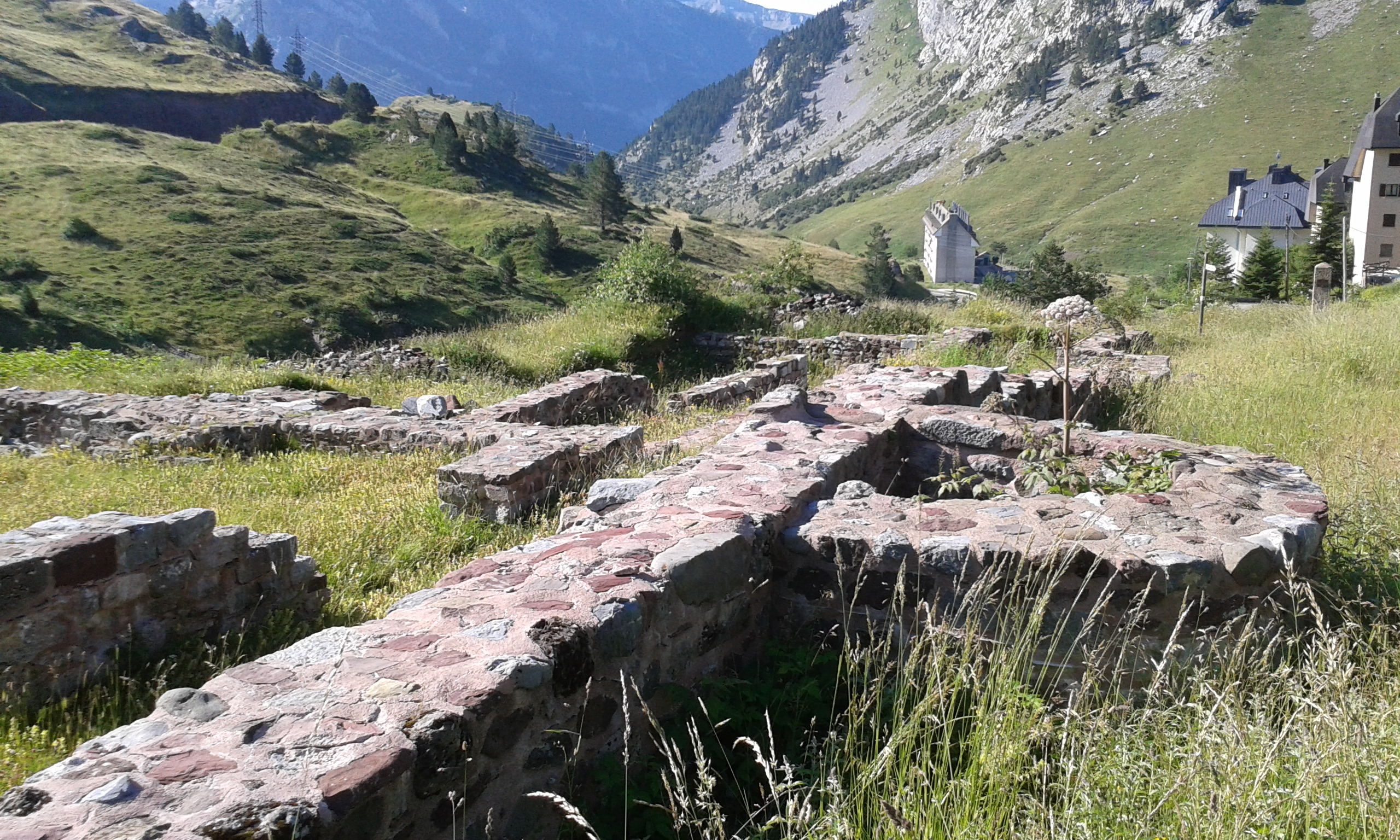 Ruinas de Hospital de Santa Cristina en Somport. Huesca